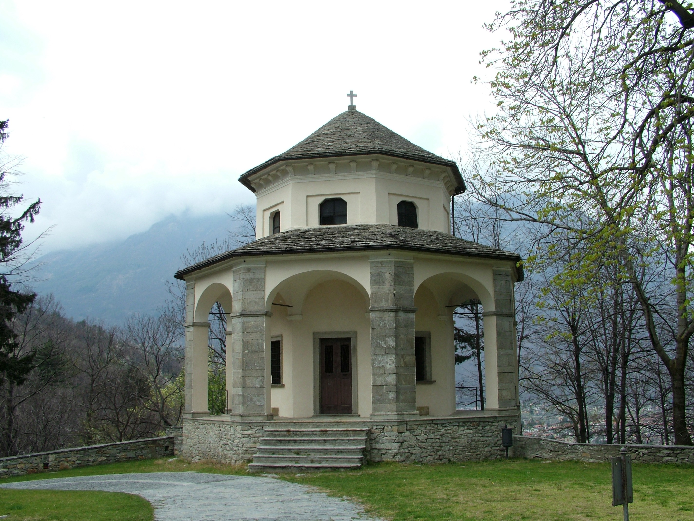 Domodossola, Italien, Sacro Monte, Stazione IX.